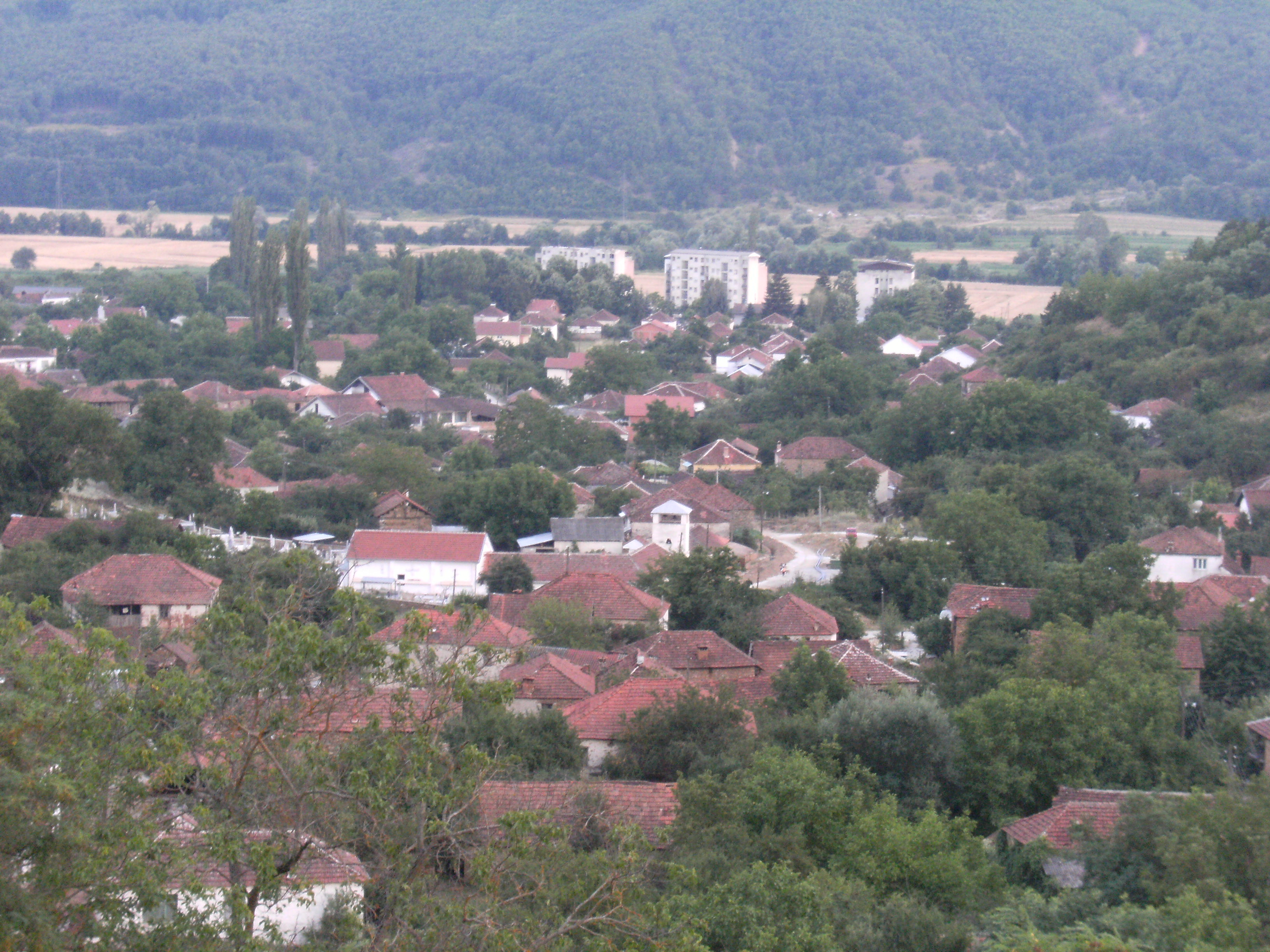 Панорама на Сопотница, Република Македония